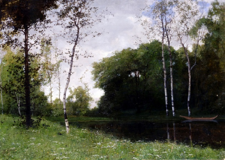 "Primavera", olio su tela, 64 x 90 cm., firmato e datato